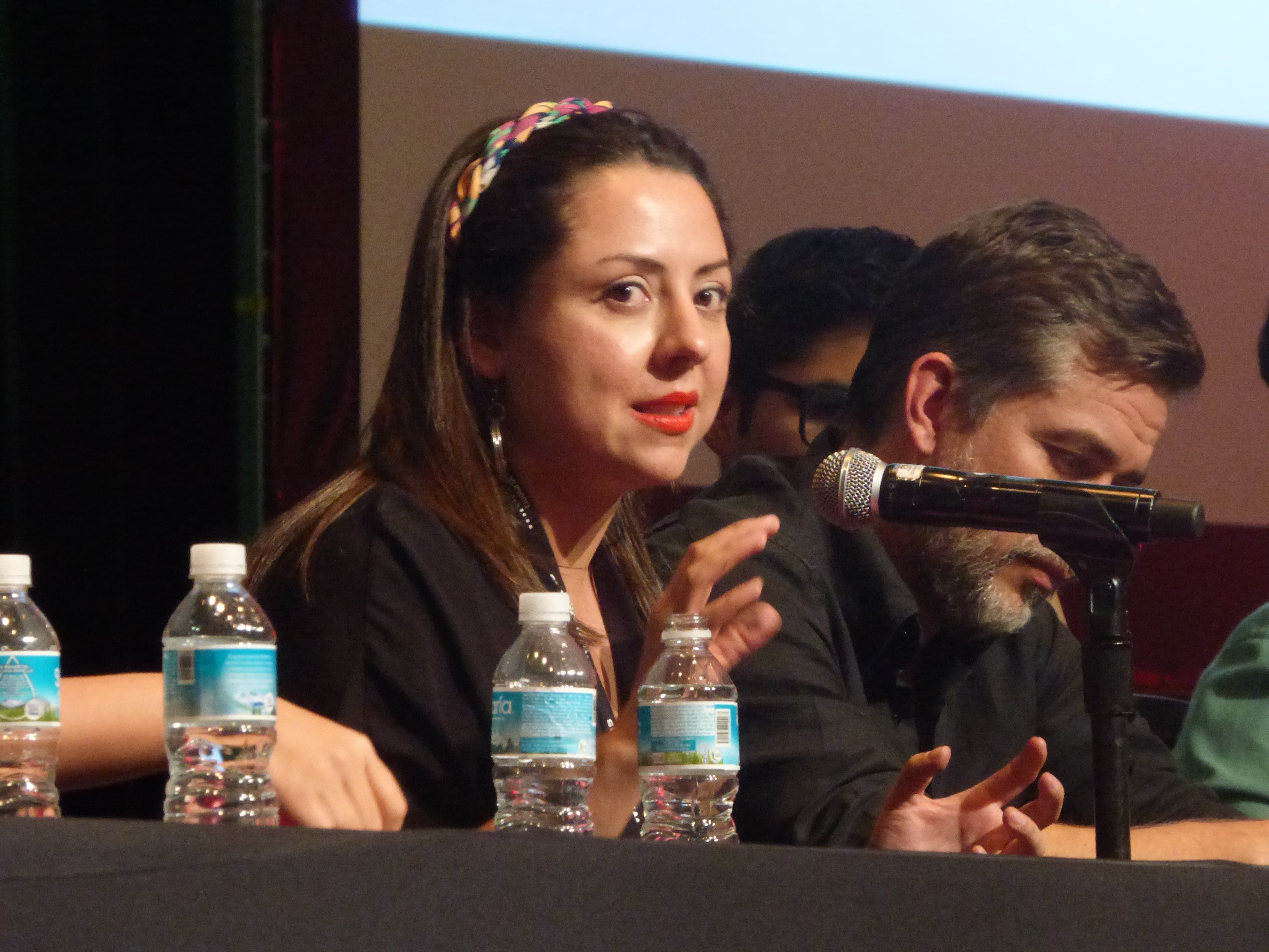 Carlos Brito, Red en Defensa de los Derechos Digitales (R3DMX, Digital Rights Defense Network) Darío Ramírez, Article 19 Mexico Katitza Rodríguez, Electronic Frontier Foundation (EFF) Renata Ávila, Web we want Paz Peña, Derechos Digitales Yana Welinder, Wikimedia Foundation Moderator: Luis Fernando García, Red en Defensa de los Derechos Digitales (R3DMX, Digital Rights Defense Network)